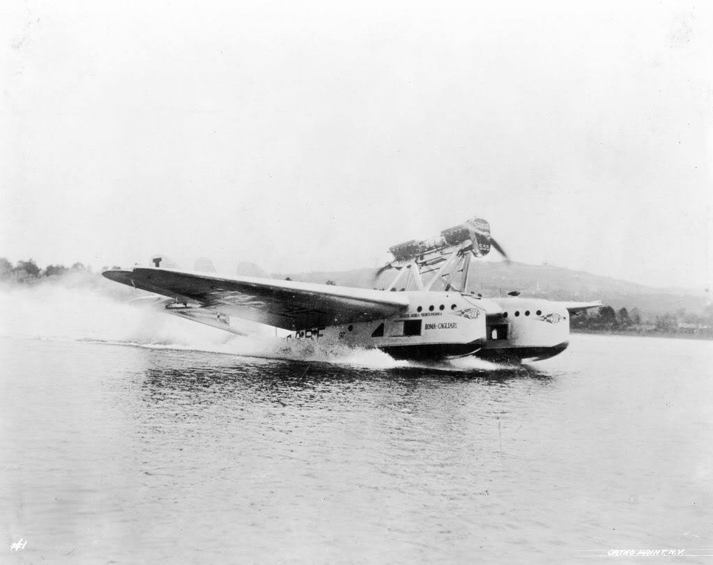 Savoia-Marchetti S.55 in flottagio